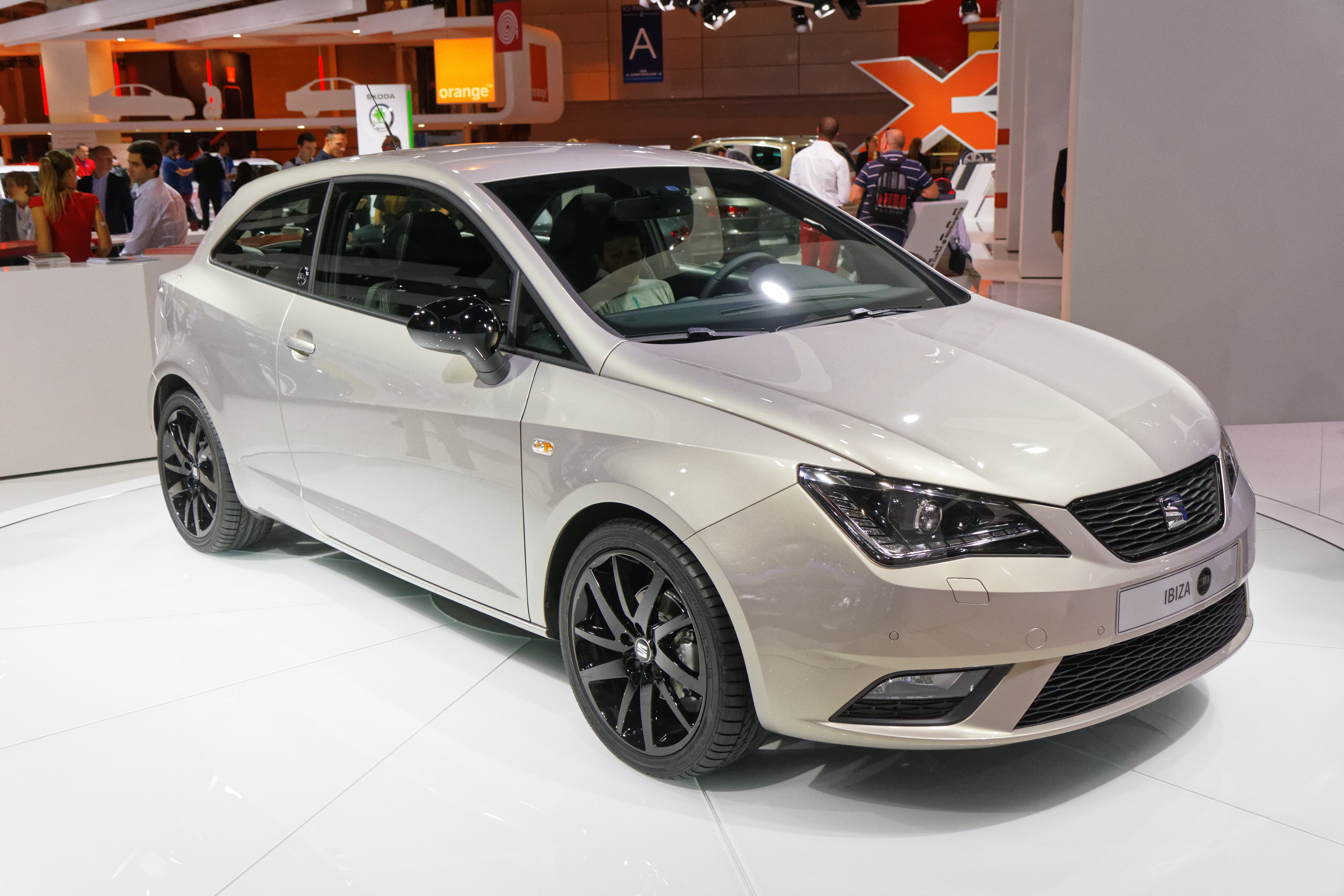 Une Seat Ibiza présentée lors du mondial de l'automobile de Paris 2014.